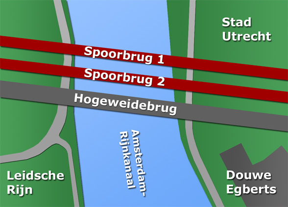 Situatieoverzicht vervanging Vleutensebrug door Hogeweidebrug